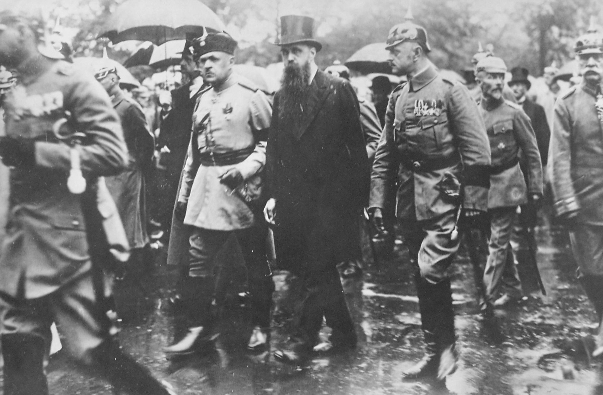 Український посол Федір Штайнгайль і турецький посол Ріфат Паша на похороні генерал-фельдмаршала Германа фон Ейхгорна.